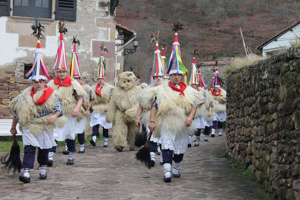 Aurtitz. (Ituren. Malerreka). Joaldunak eta hartza. Inauteriak.